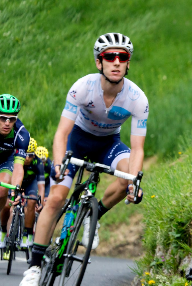 9245 yates